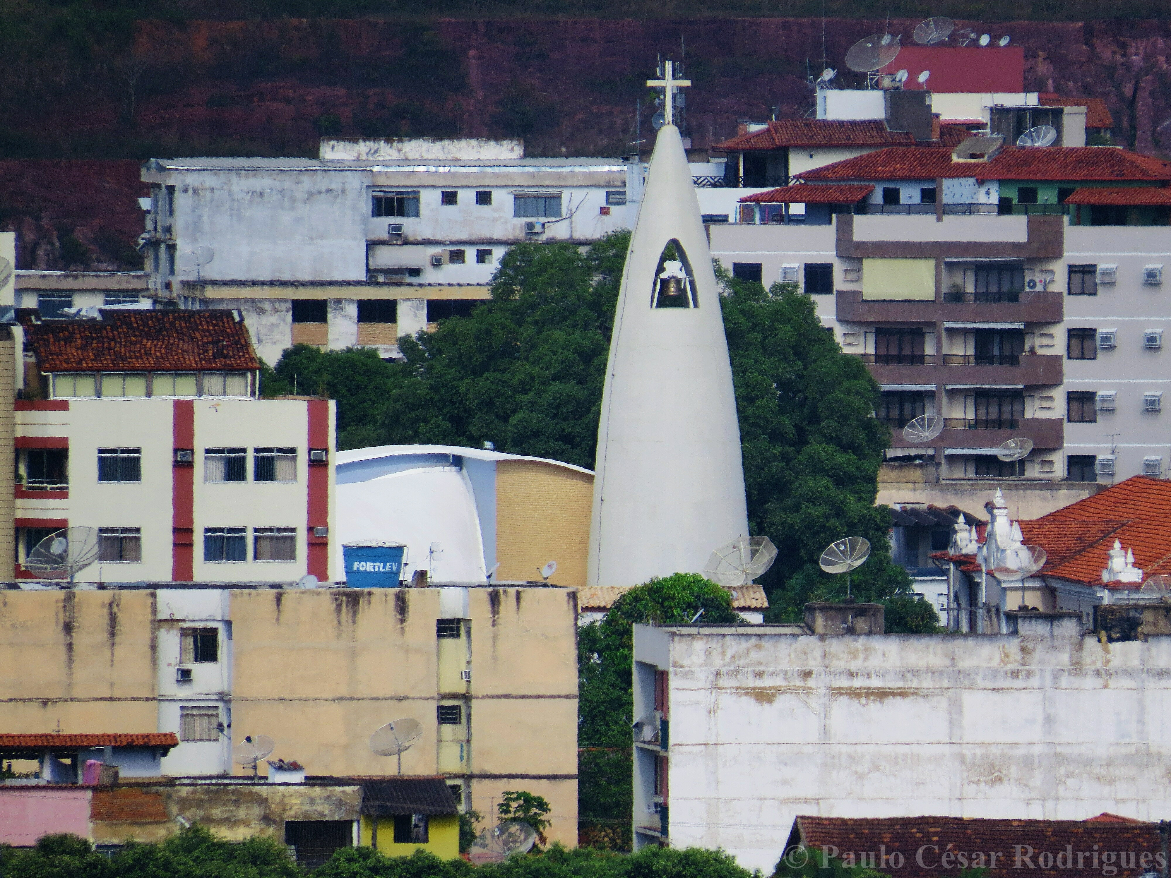 Torre da Igreja Matriz em Cataguases MG